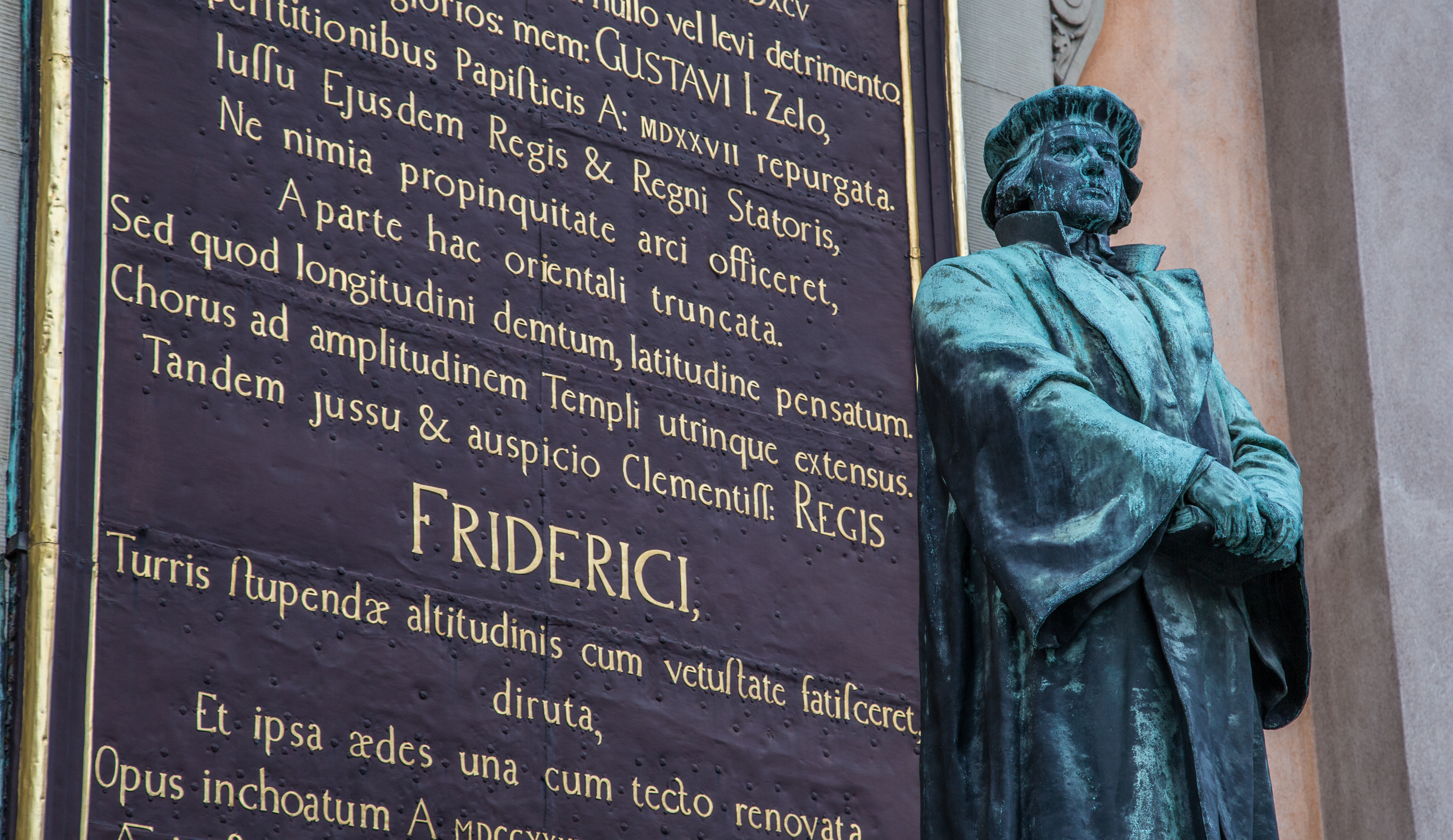 Stockholm, Sweden